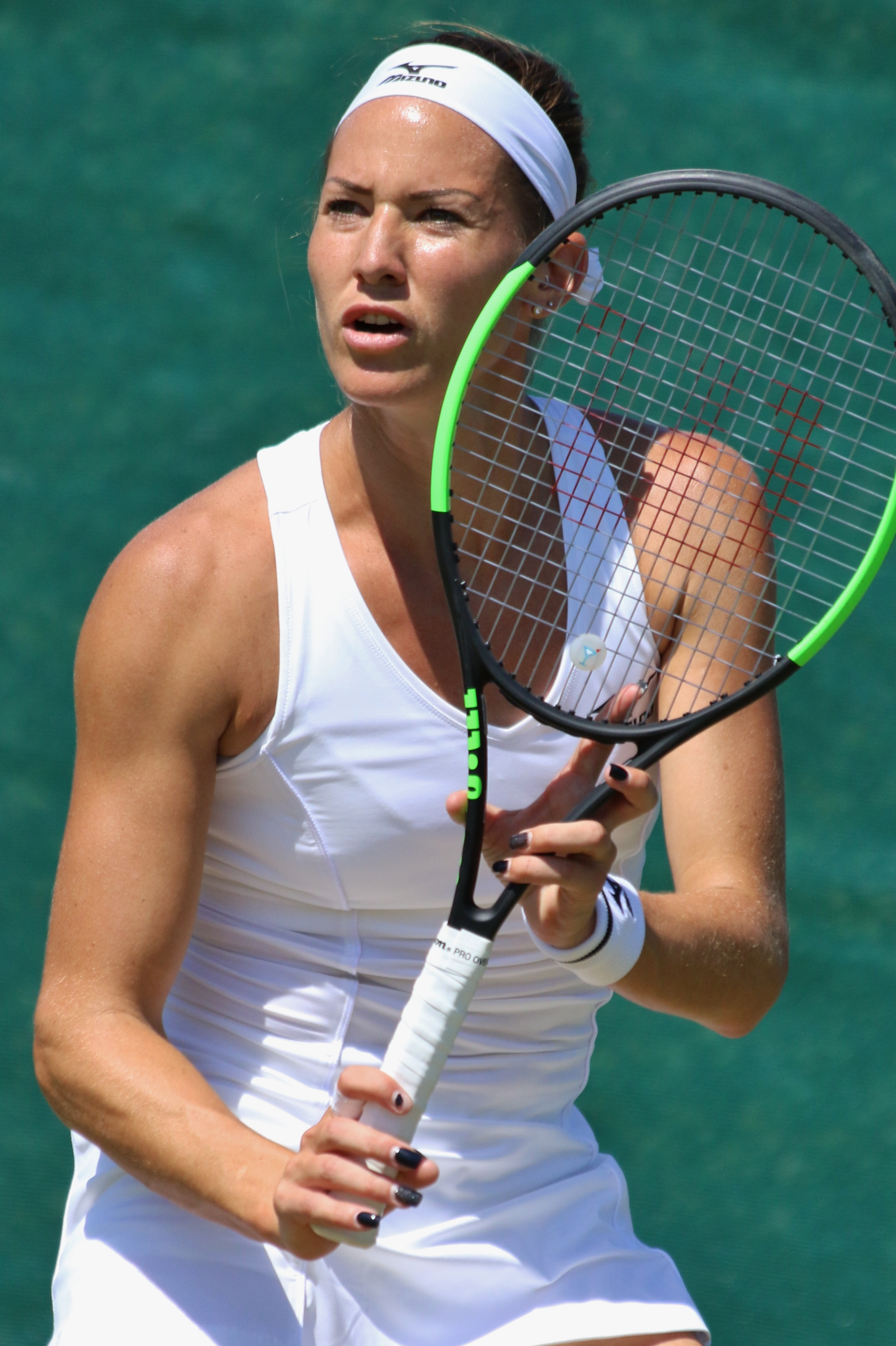 Perrin WMQ18 (7)